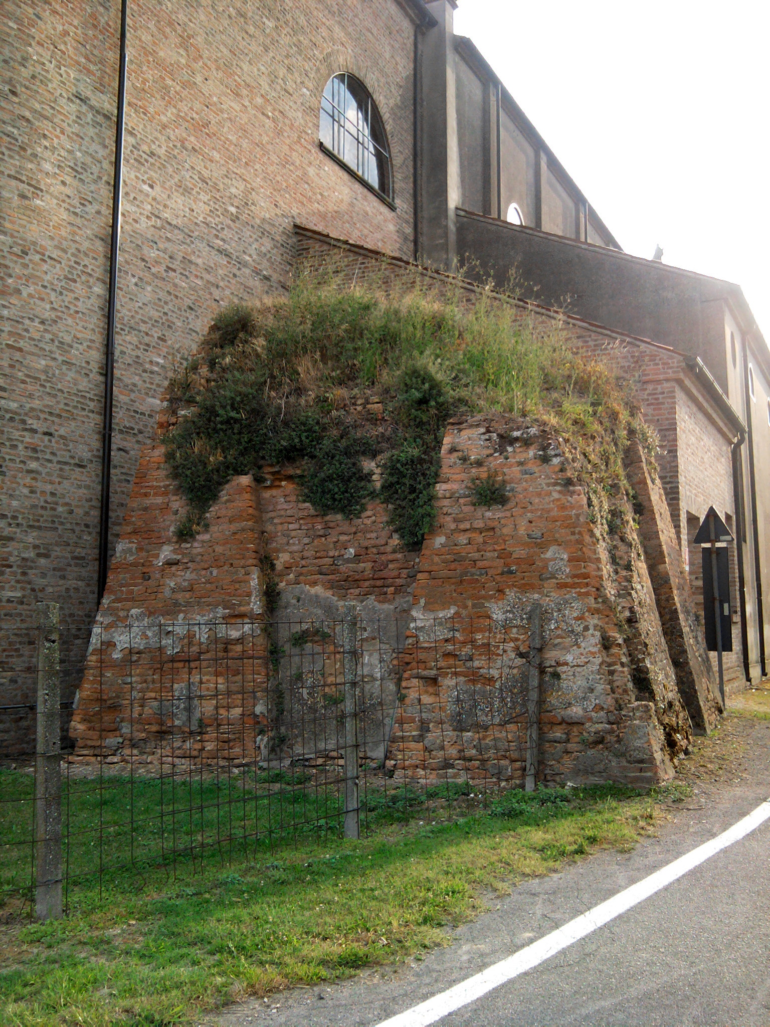 Ramo di Palo, frazione di Lendinara: i resti del campanile della chiesa parrocchiale di San Giacomo.